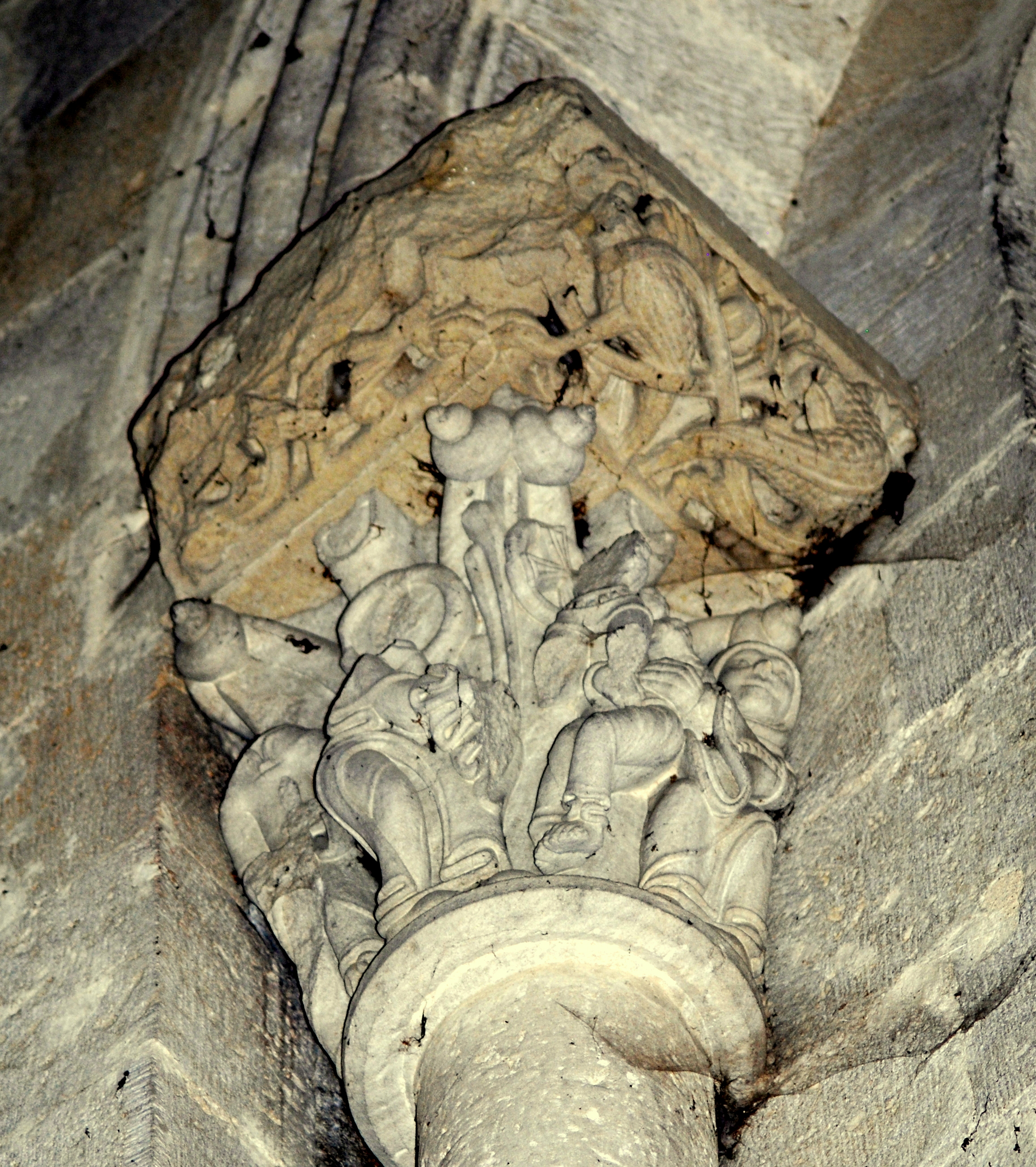 Chapiteaux abbaye de Saint-Ferme